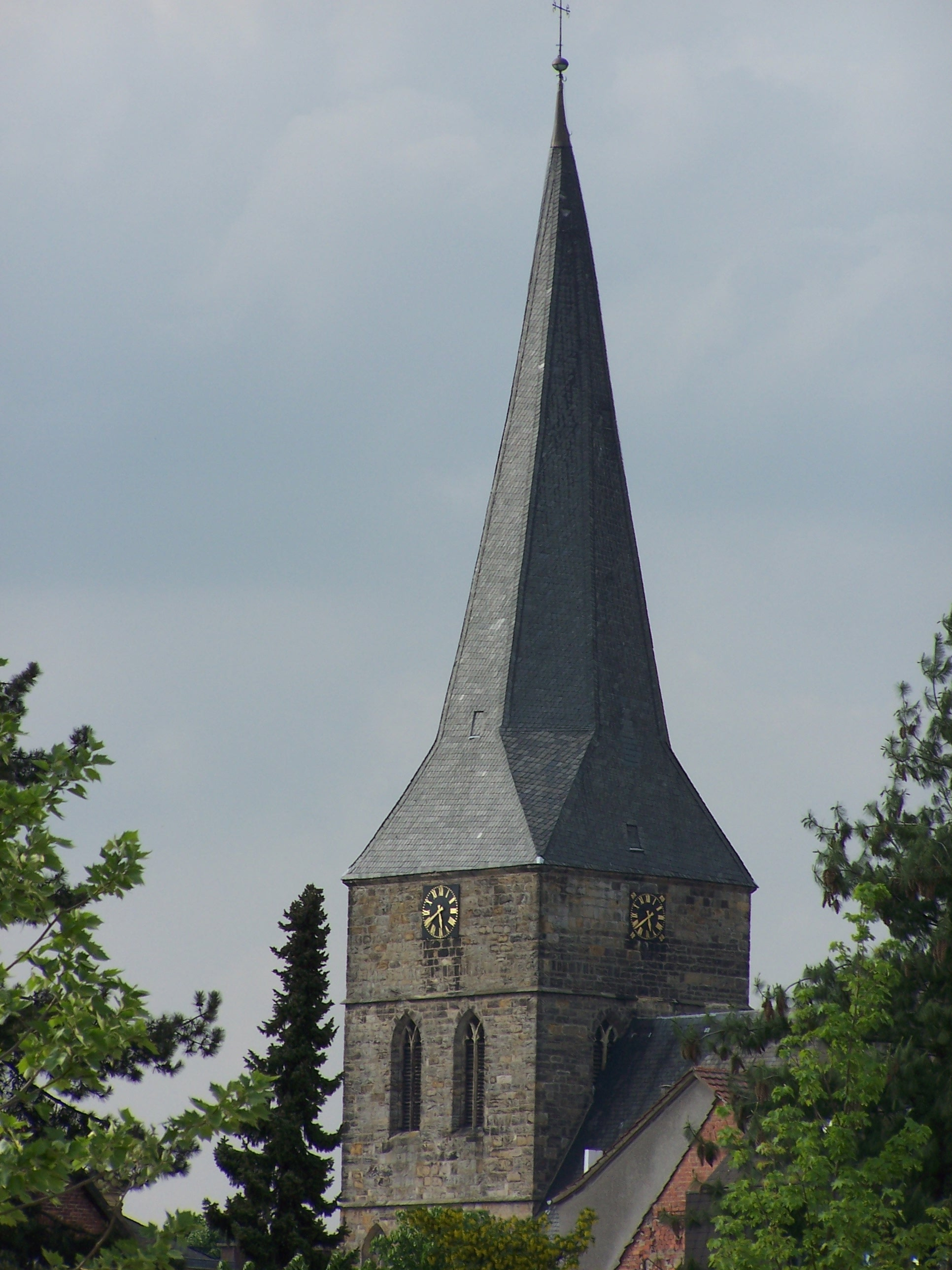 Das Bild zeigt den Turm der evangelischen Stadtkirche Lengerich (Westfalen)